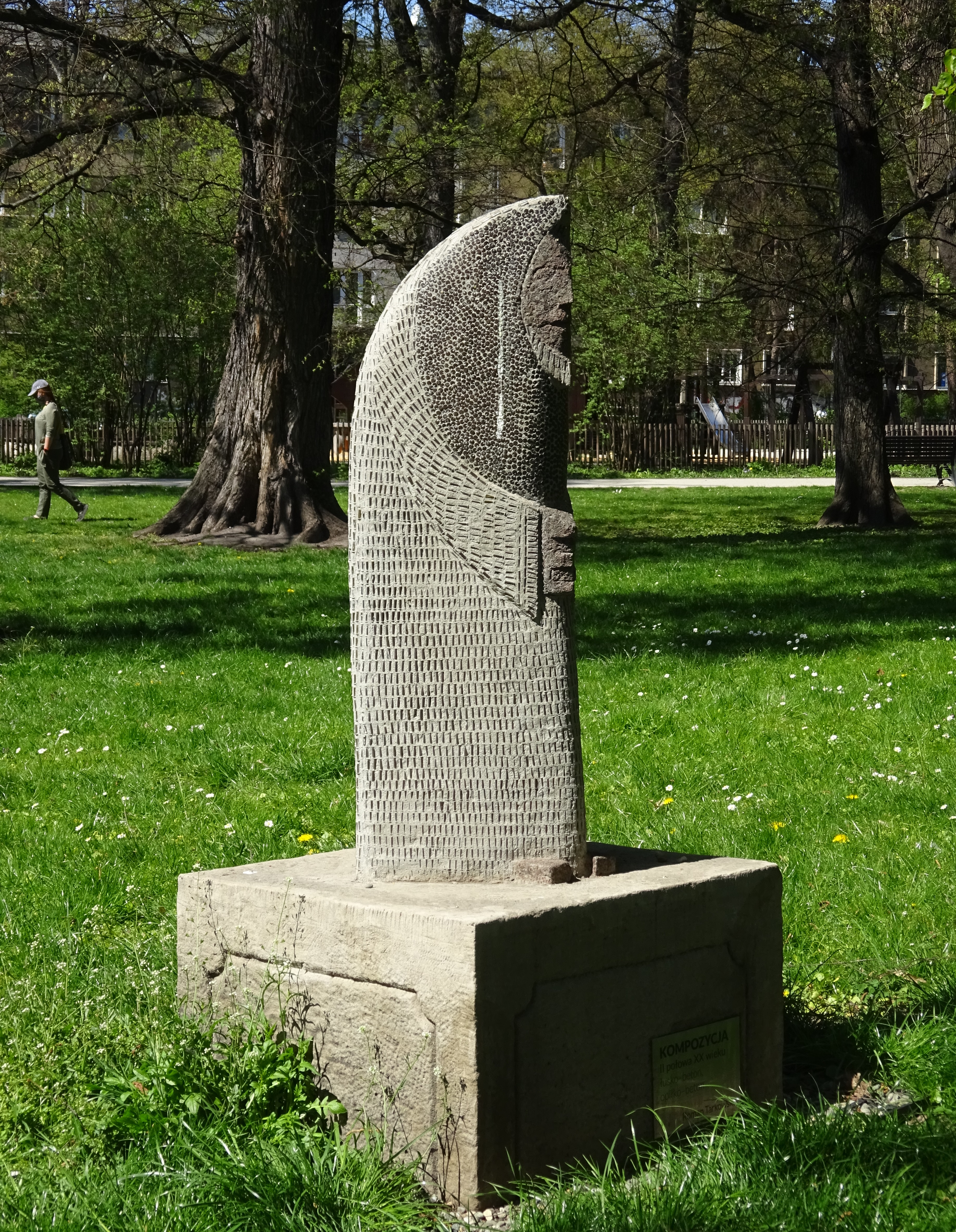 Rzeźba „Kompozycja”, autorstwa Romana Tarkowskiego z II połowy XX wieku, znajdująca się w Parku Krakowskim w Krakowie.